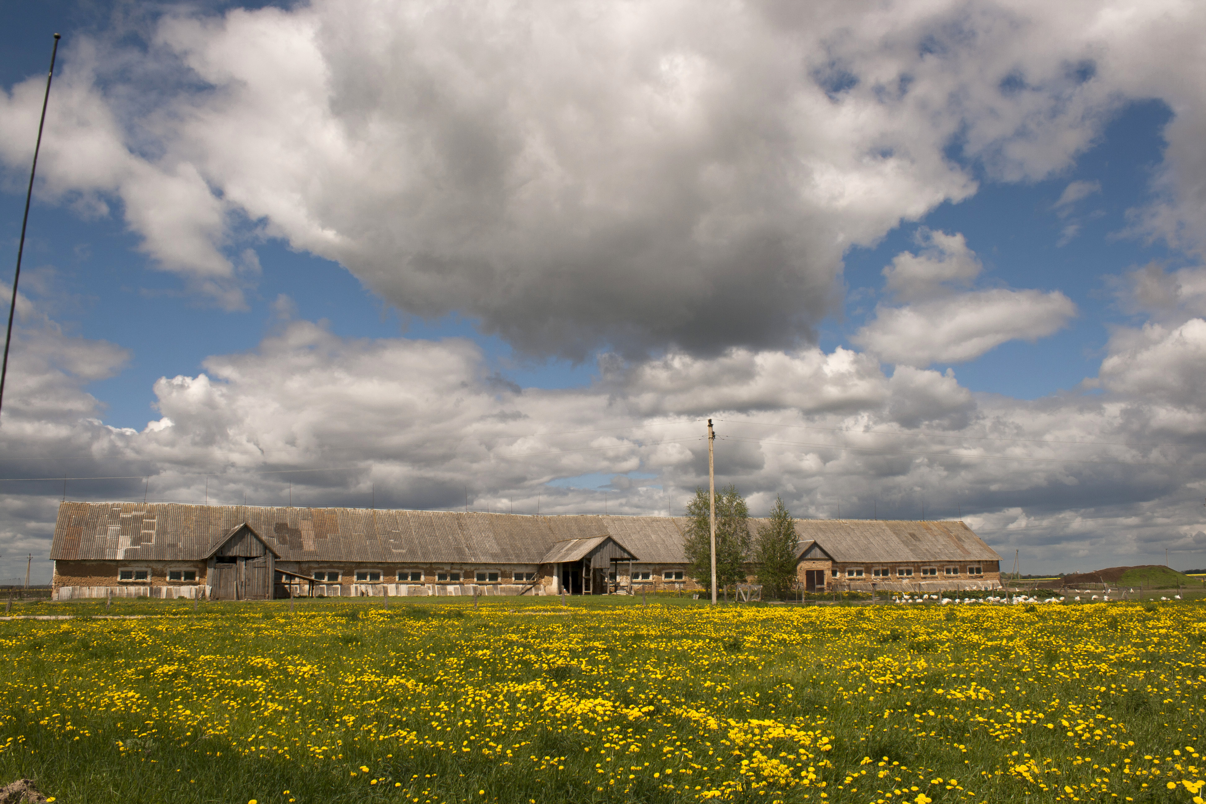 Jauneikiai